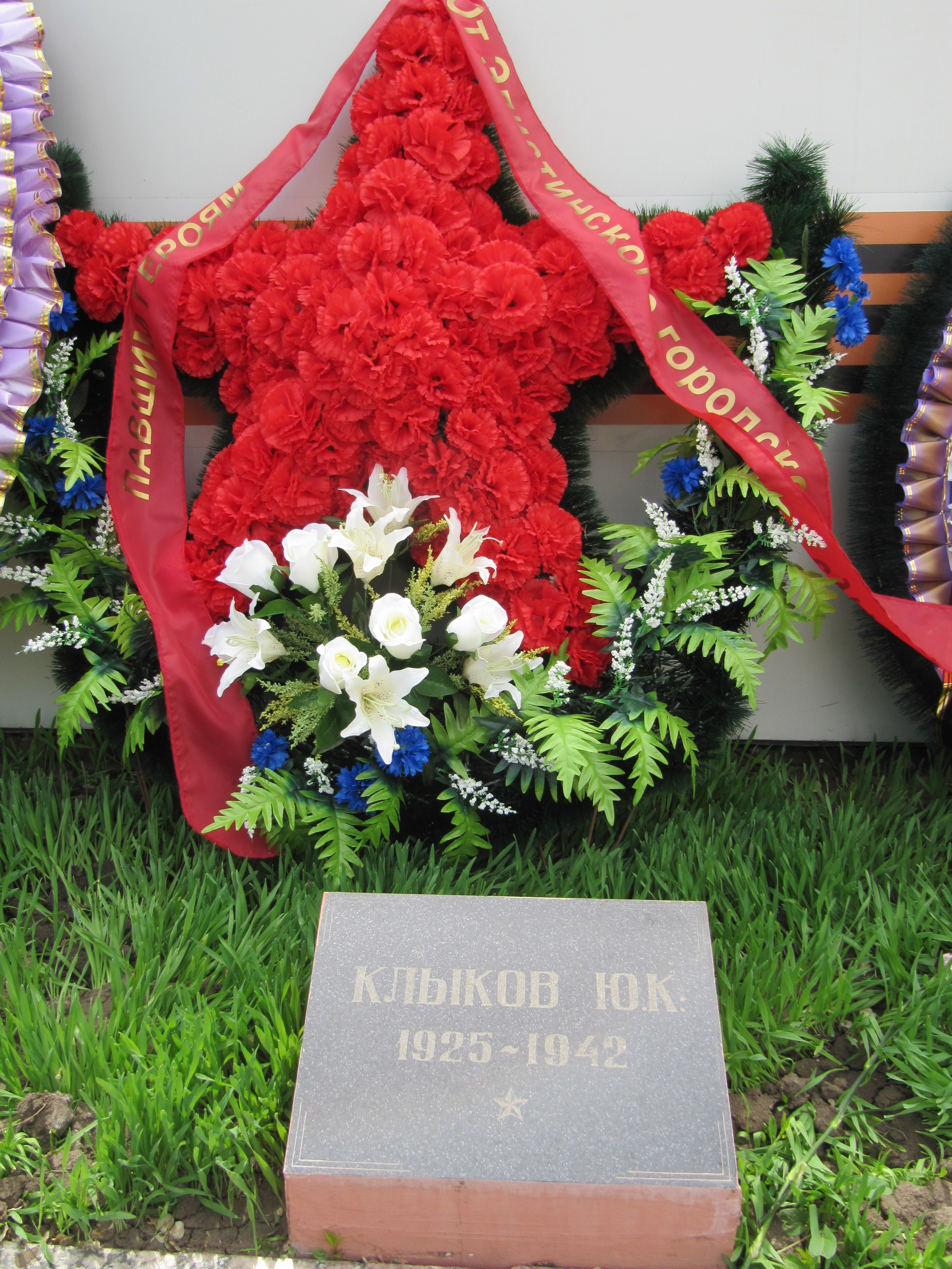 Захоронение партизана Юрия Клыкова, Мемориальный комплекс героев Гражданской и Отечественной войн, Элиста, Калмыкия